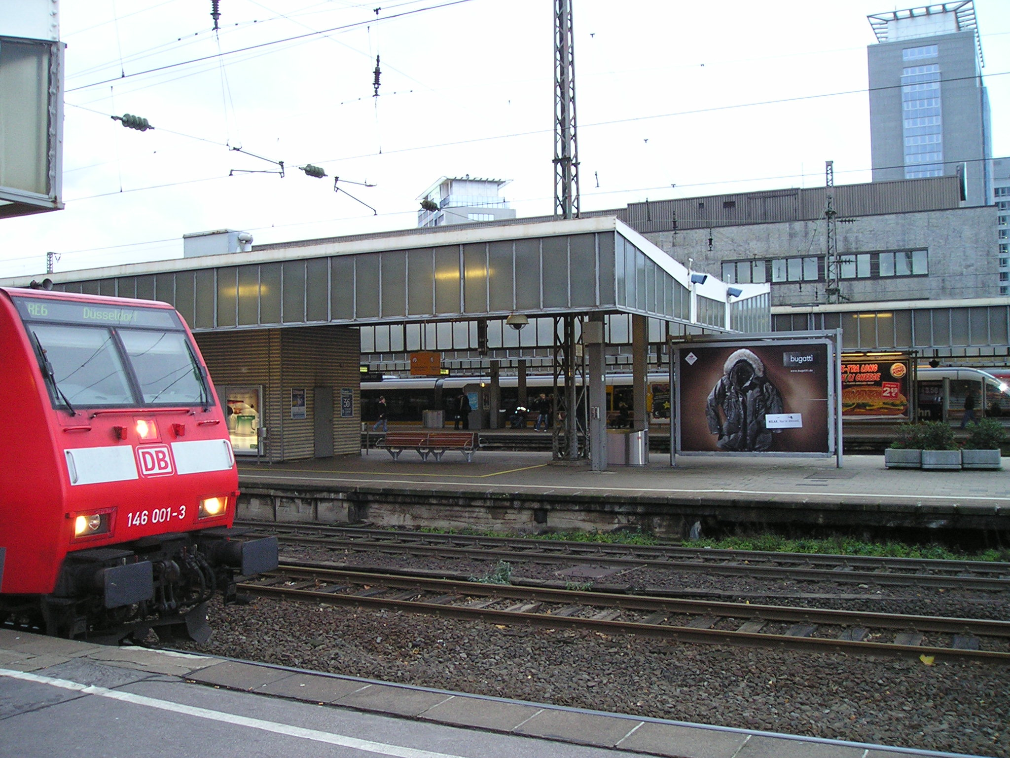 Essener Hauptbahnhof, in the background Haus der Technik